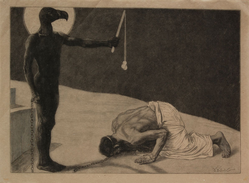 Der Mammon und sein Sklave. Holzstich. Aus der Reihe "Meisterwerke der Holzschneidekunst", Verlag J. J. Weber, Leipzig.